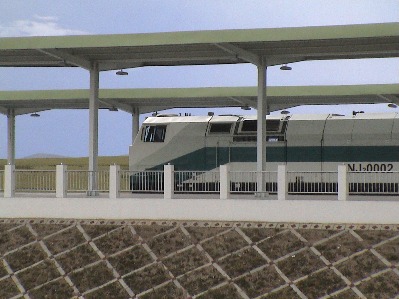 NJ2型柴油机车专用于青藏铁路。